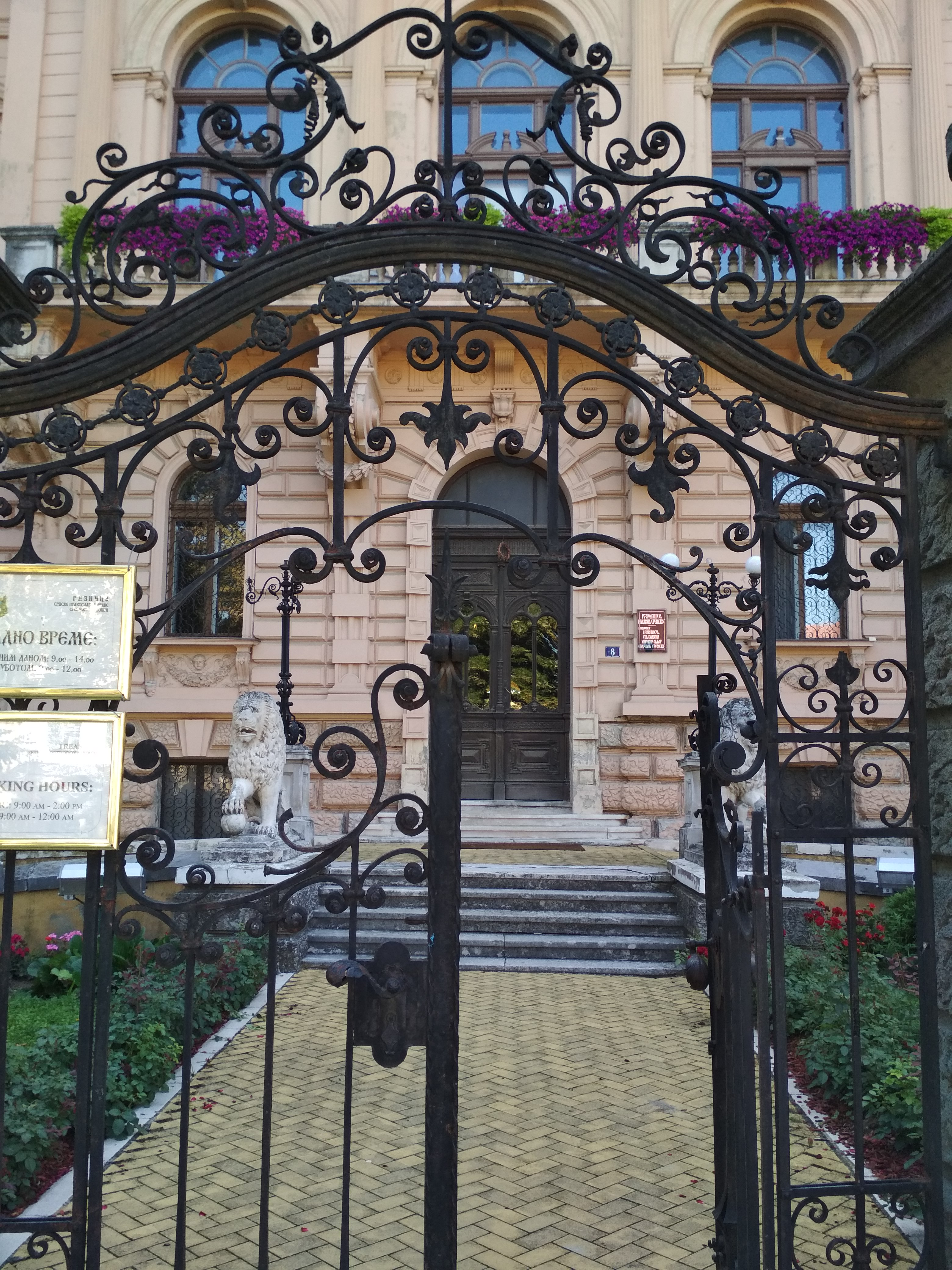 Српски (ћирилица): Здање је подигнуто за потребе интерната за ђаке карловачке Богословије 1901-1903. године под покровитељством патријарха Георгија Бранковића. Аутор пројекта био је архитекта Владимир Николић.